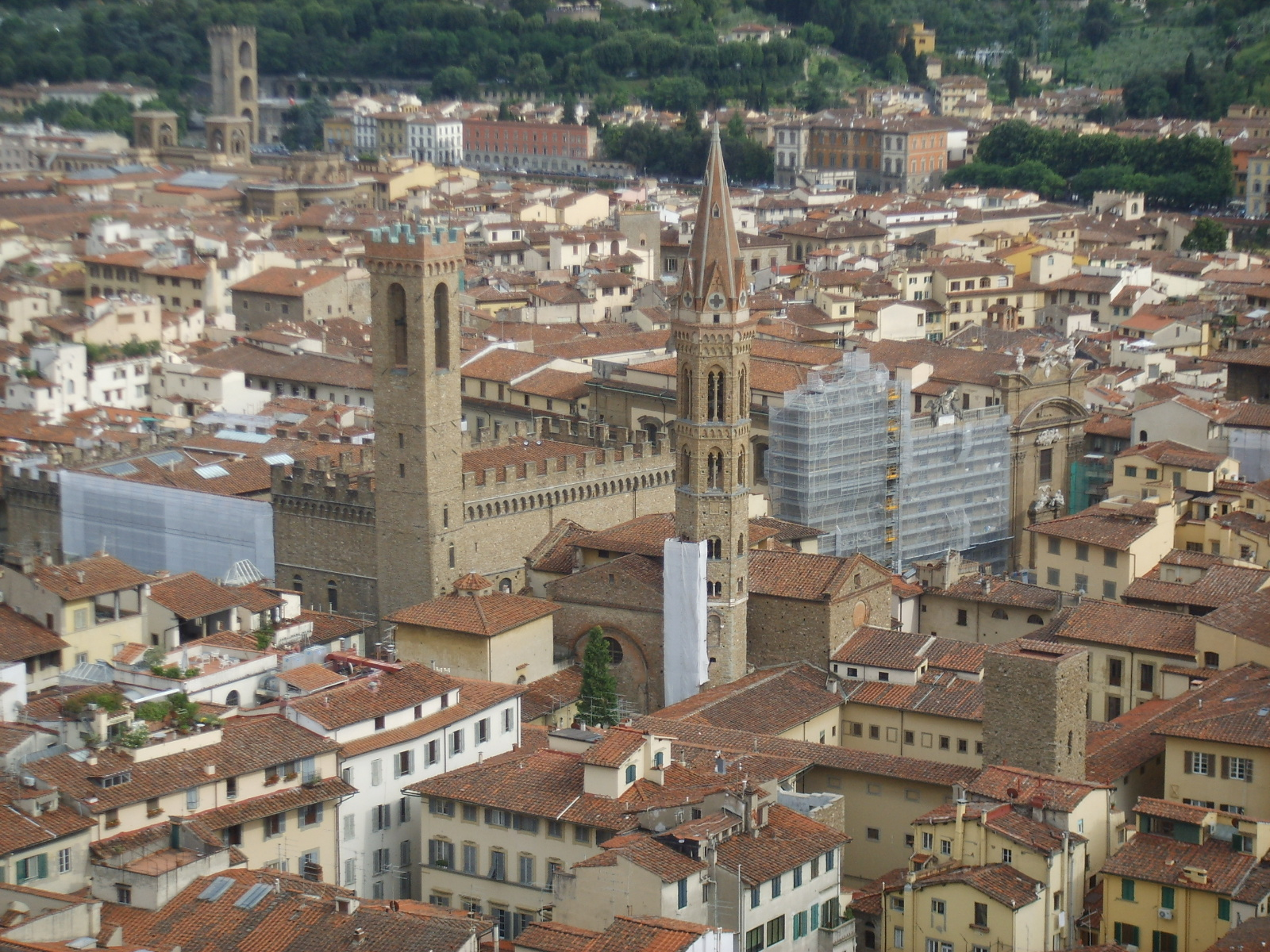 Panorama con vista su Badia fiorentina, Palazzo Serristori e Museo del Bargello a Firenze.